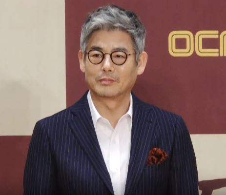 디스패치 구독 클릭!